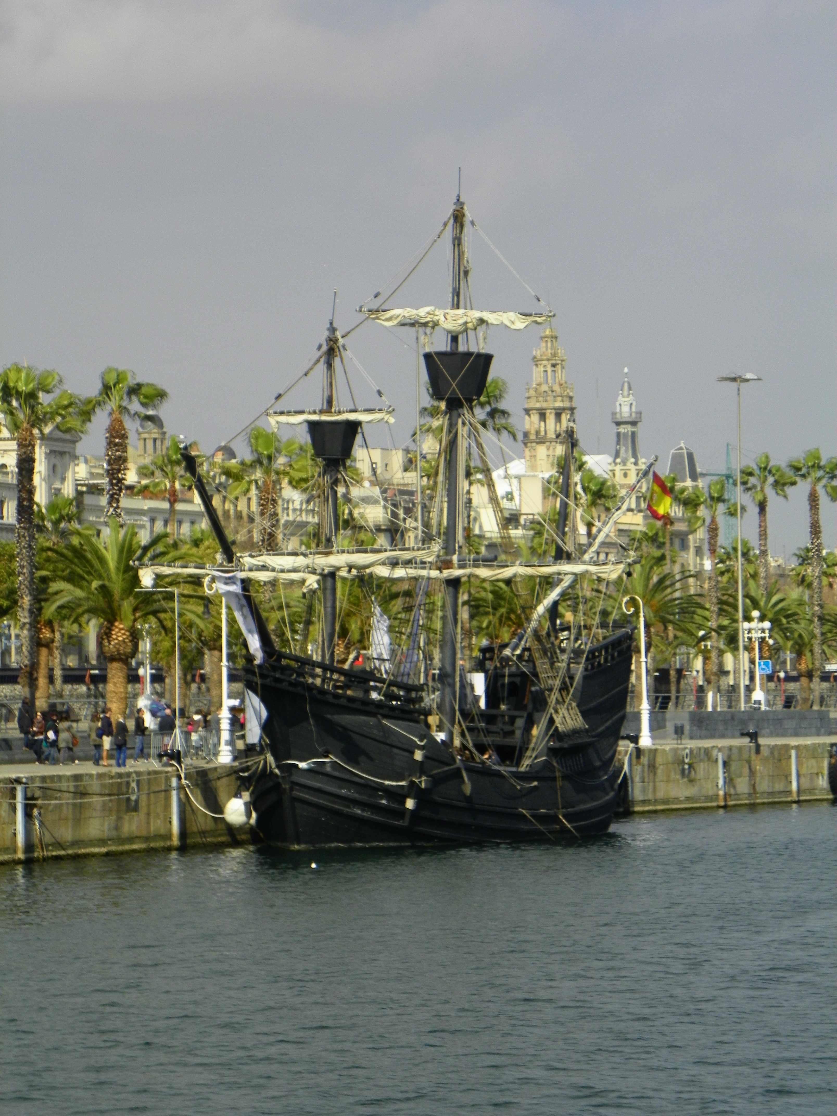 Rambla Del Mar, Barcelona, España